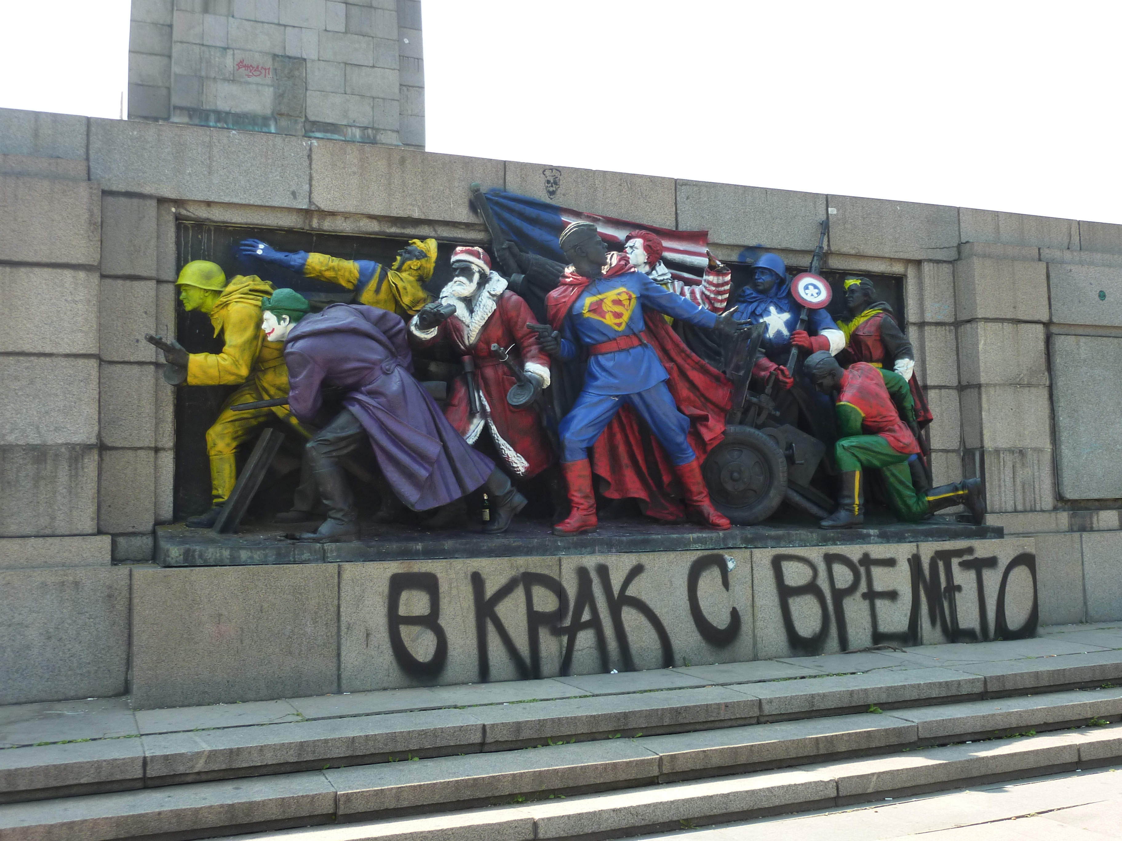 Скулптури от Паметника на Съветската армия изрисувани в попарт стил (18 юни - 21 юни 2011 г.)